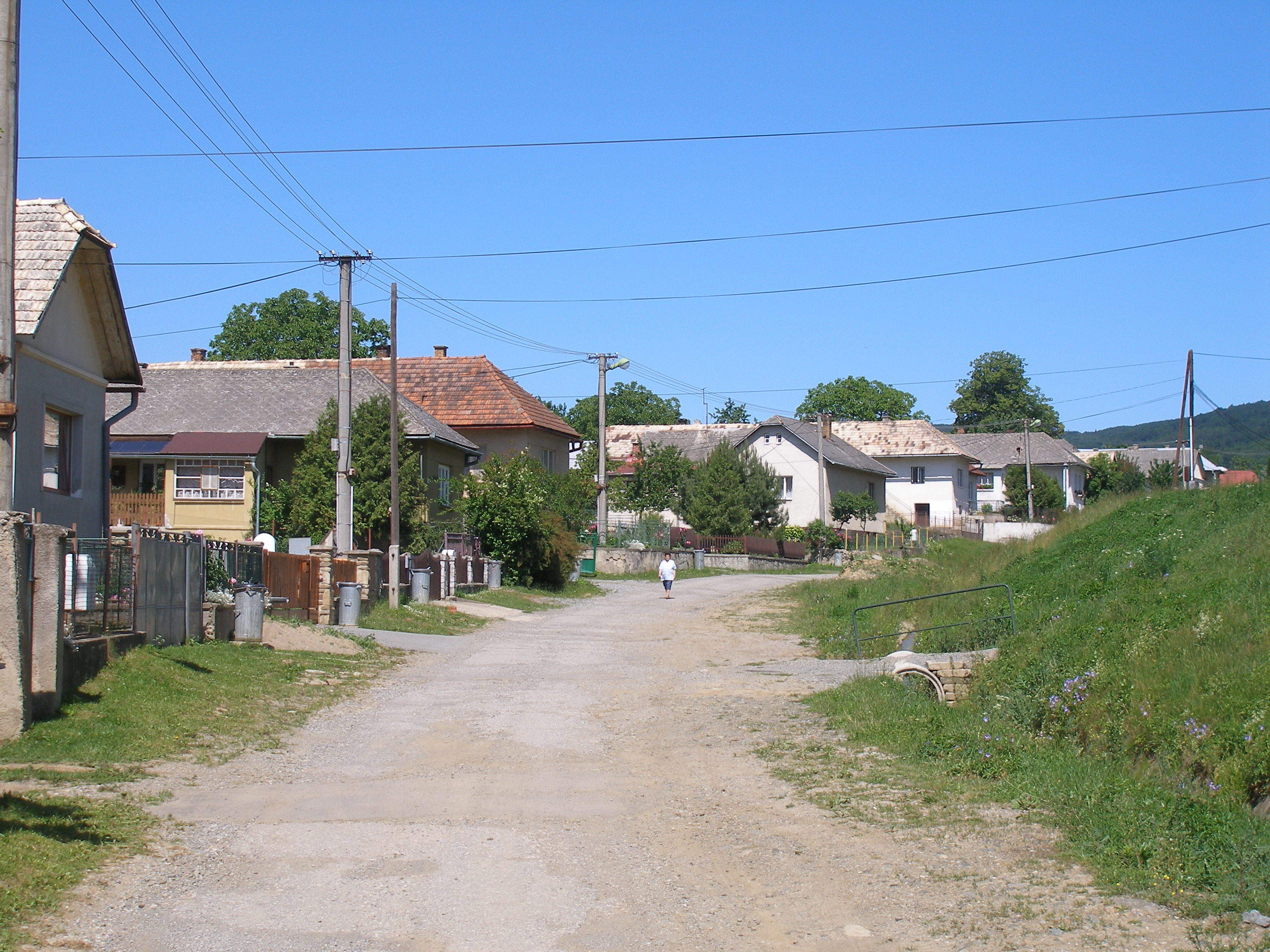 Obec Uzovský Šalgov okres Sabinov.